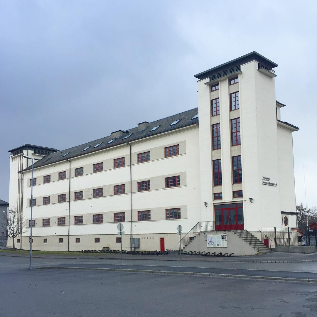 Florø barneskule var eit storslege byggverk då det stod ferdig i 1934, bygd i dei harde 30-åra. Framleis er det ein imponerande bygning!